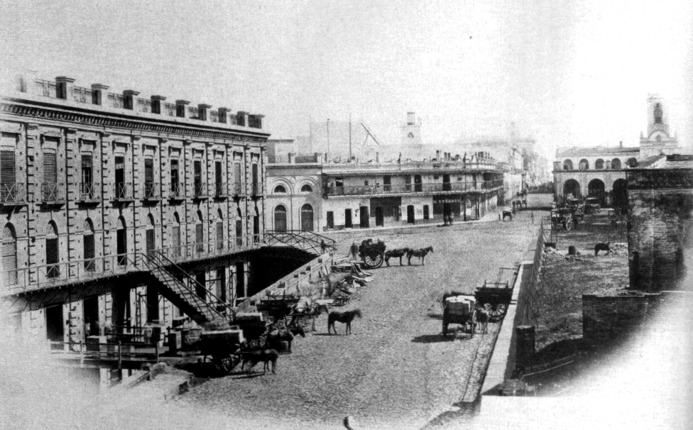 Imagen de la antigua calle Victoria (actual Hipólito Yrigoyen), en Buenos Aires. A la derecha puede verse la Recova que existía en la actual Plaza de Mayo, y en el fondo el Cabildo.